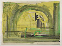 Bart des Tuthem Kamon